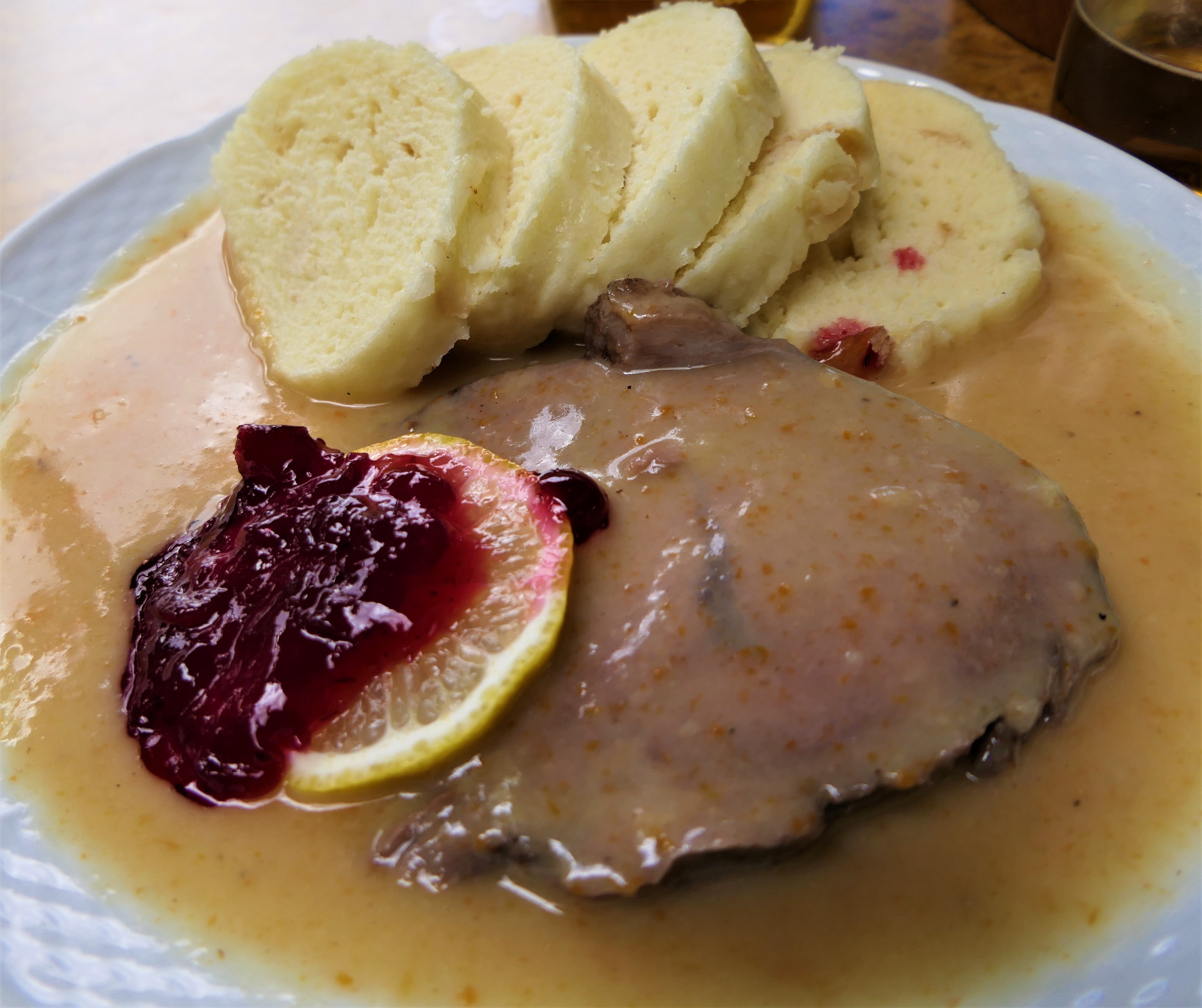 Böhmischer Sauerbraten mit Knödeln und Preiselbeeren.(Böhmische Schweiz)